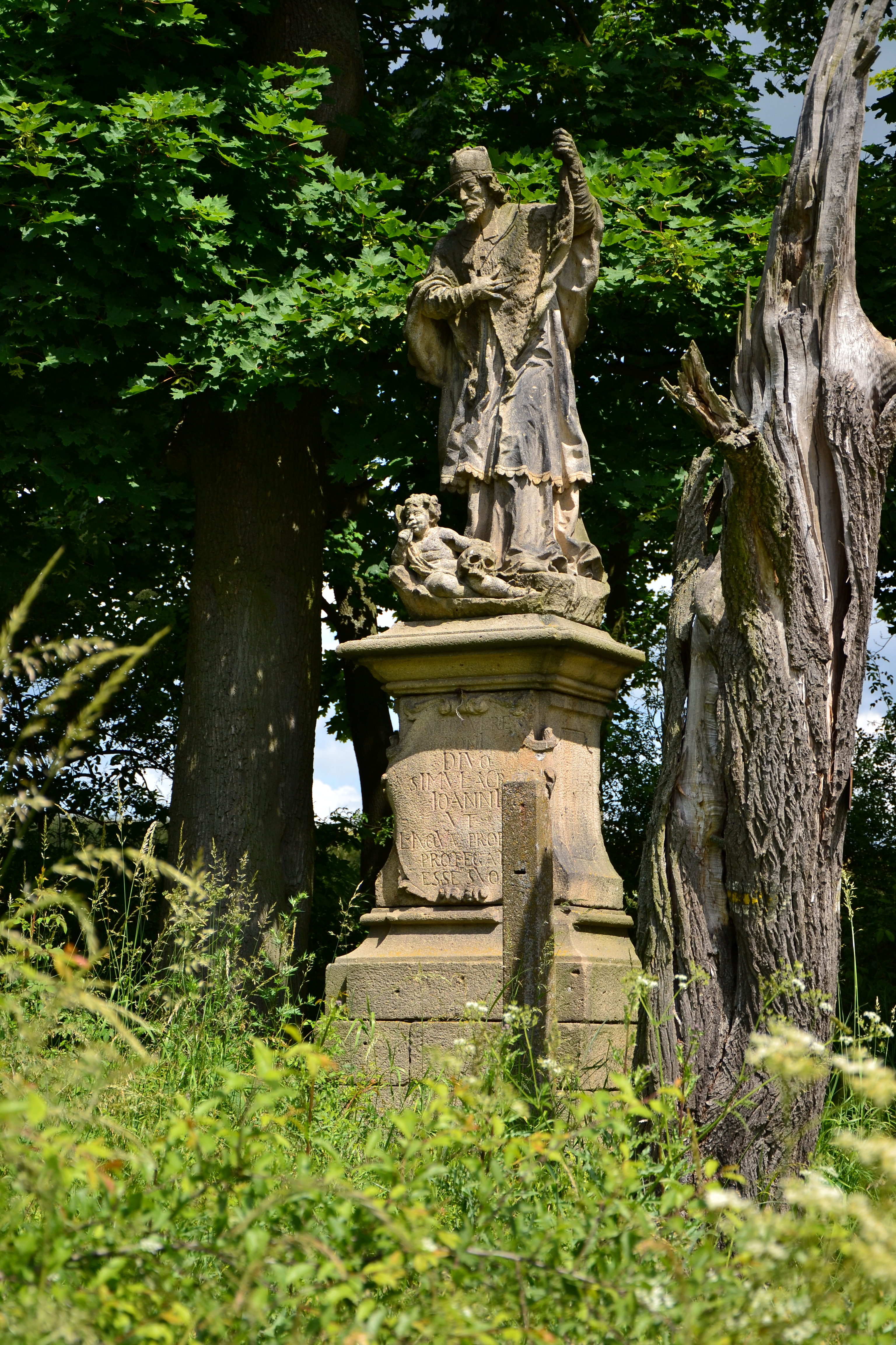 Socha sv. Jana Nepomuckého (Černá Hať), Černá Hať